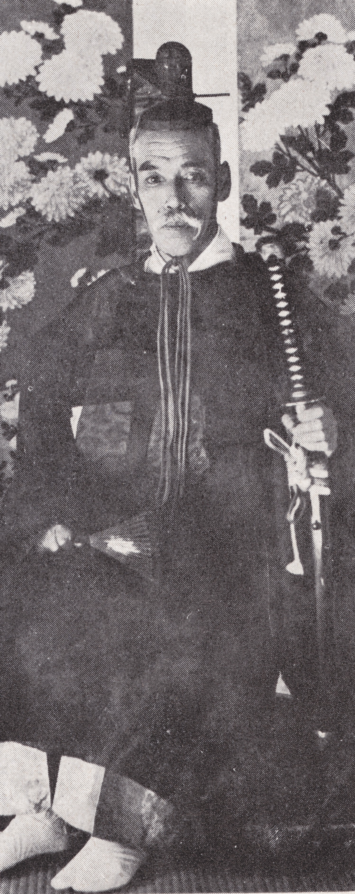 大礼使典儀官・子爵萩原員種